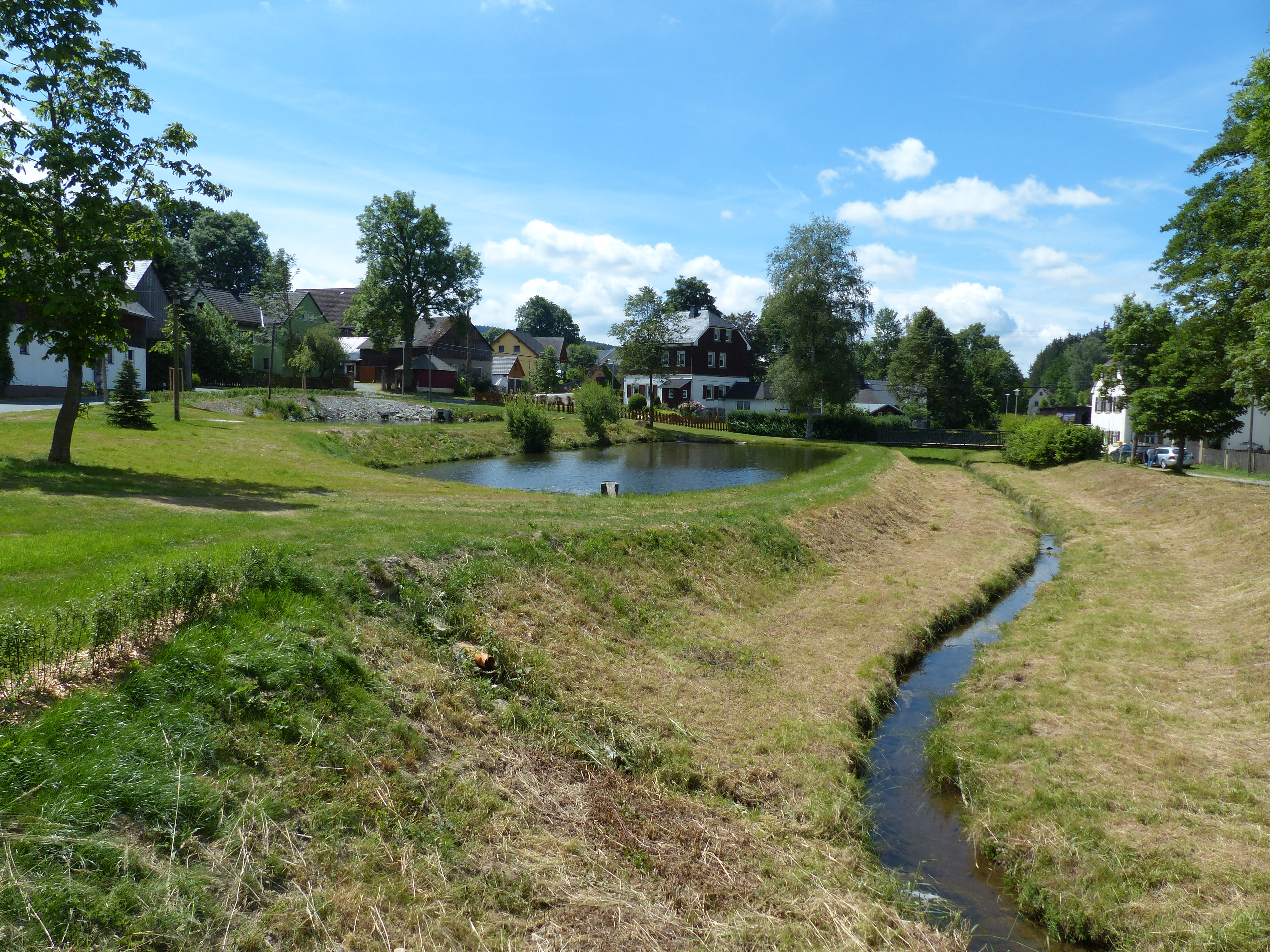 Förmitz, Ortsteil von Schwarzenbach an der Saale